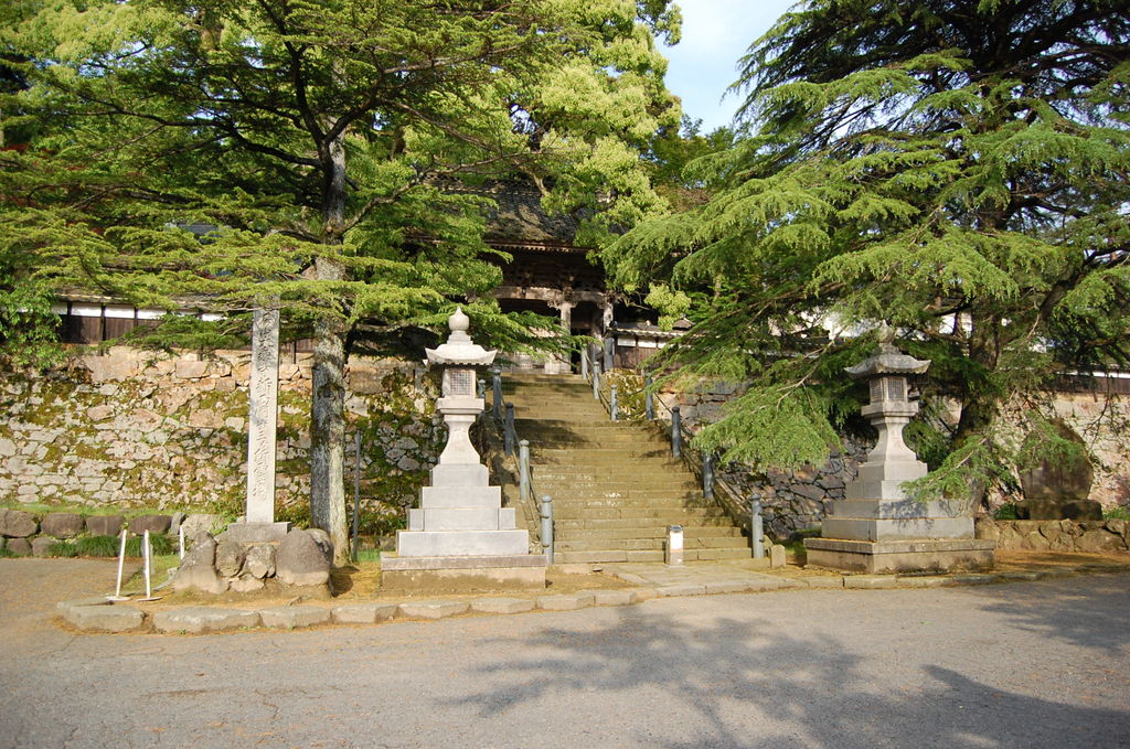 大乗寺。兵庫県美方郡香美町。応挙寺とも呼ばれる。